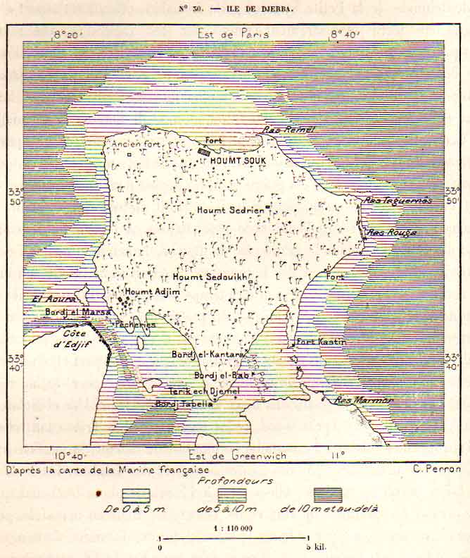 Carte de Djerba, Tunisie